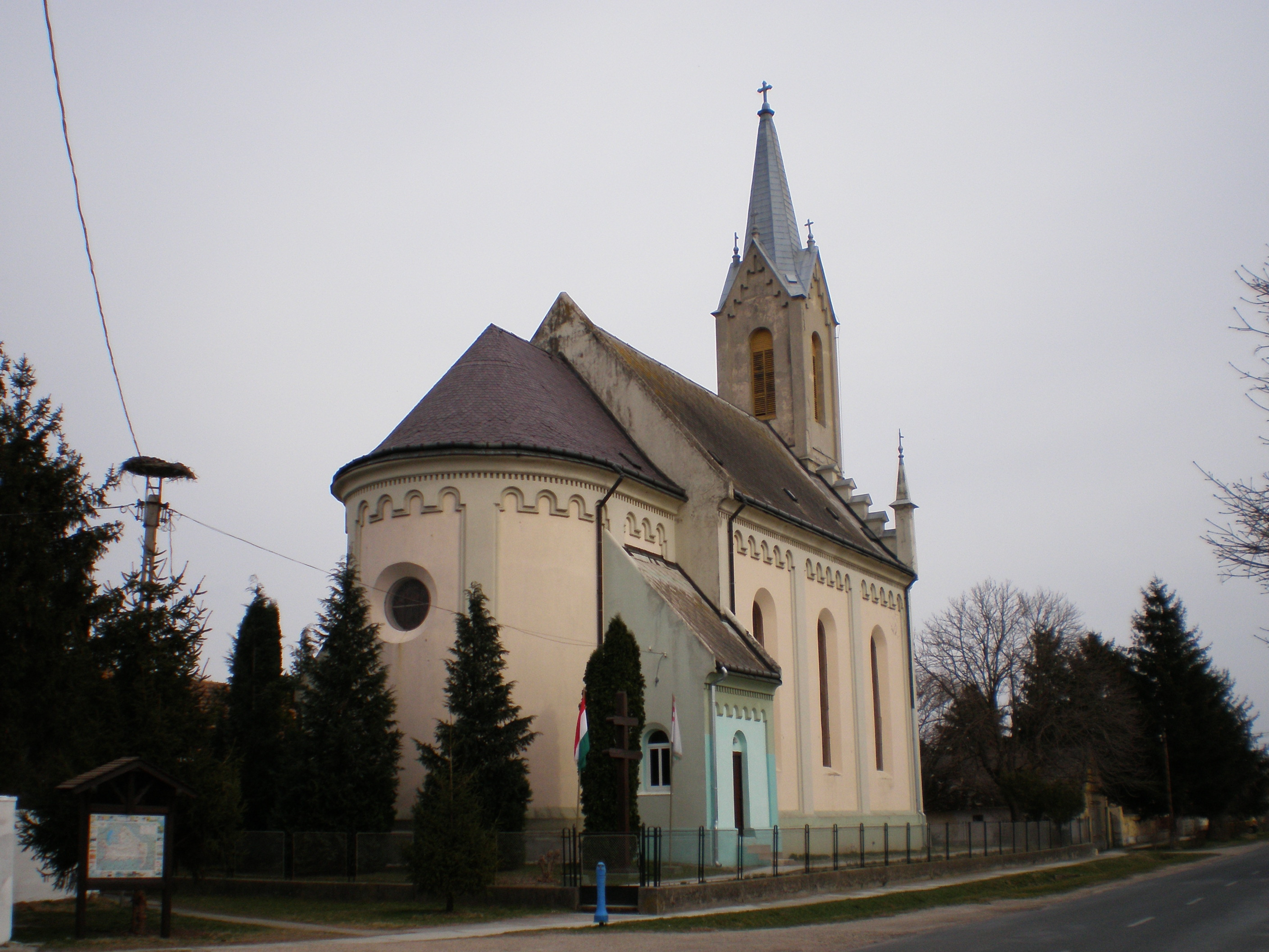 Római katolikus templom (Mecsér, Győr-Moson-Sopron megye, Magyarország)